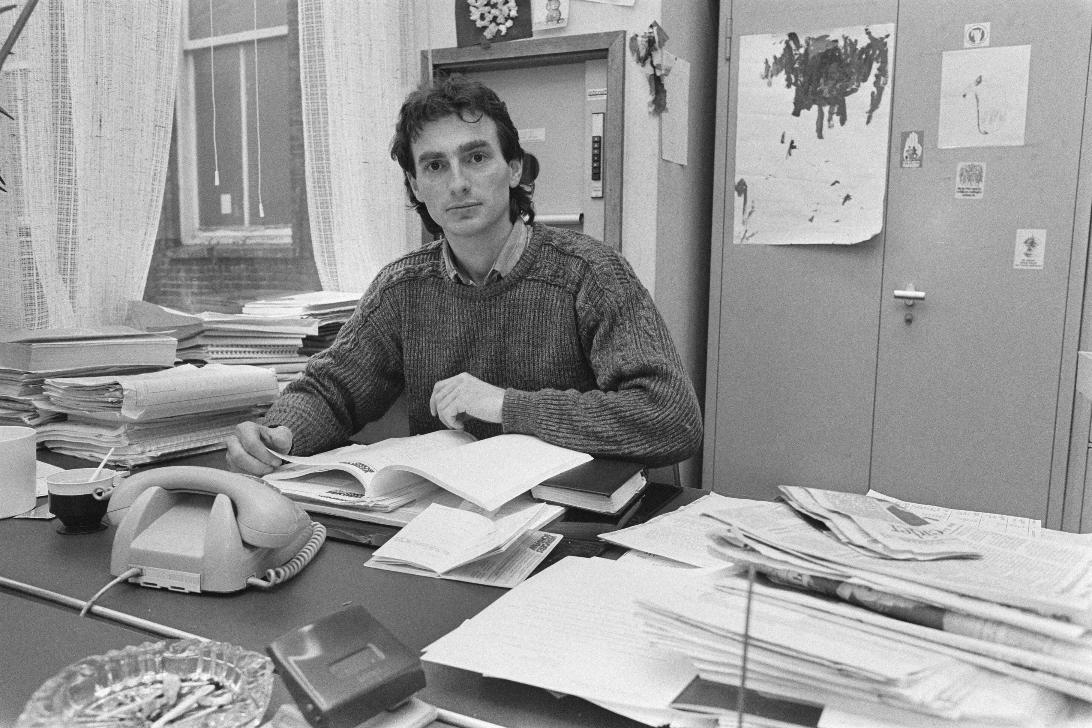 Collectie / Archief : Fotocollectie Anefo Reportage / Serie : [ onbekend ] Beschrijving : Rotterdamse stakingsleider Paul Rosenmoller (staking in de stukgoed), achter bureau Datum : 22 januari 1987 Locatie : Rotterdam, Zuid-Holland Trefwoorden : Stakingen Persoonsnaam : Rosenmöller, Paul Fotograaf : Croes, Rob C. / Anefo Auteursrechthebbende : Nationaal Archief Materiaalsoort : Negatief (zwart/wit) Nummer archiefinventaris : bekijk toegang 2.24.01.05 Bestanddeelnummer : 933-8685